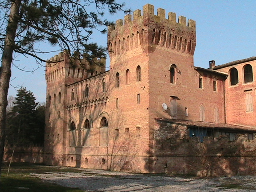 San Lorenzo de' Picenardi - il Castello